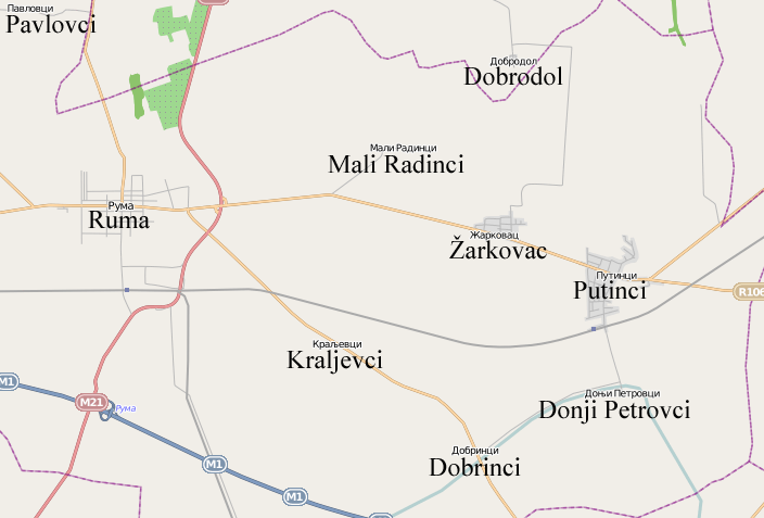 Mapa Rume i okolnih naselja.